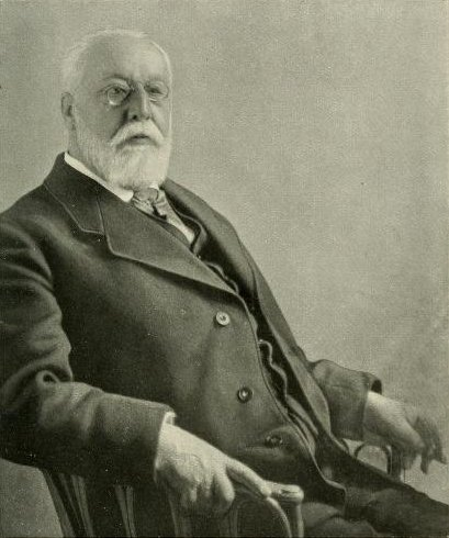 Theophil Rudolf Studer, 1845–1922